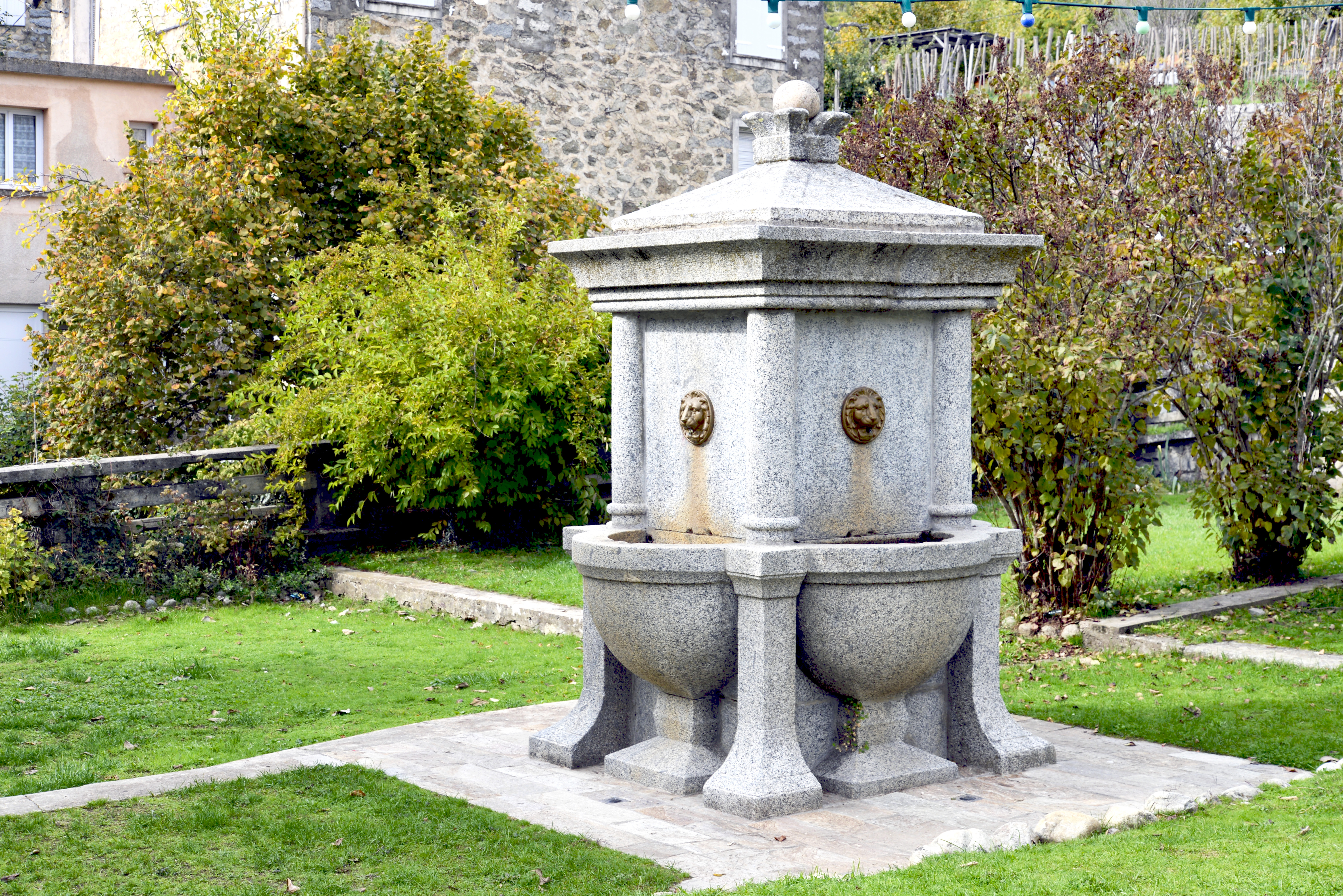 Bastelica, Prunelli (Corse) - Fontaine de Boccialacce au cœur du village, construite au XXe siècle. Des têtes de lions représentent les quatre déversoirs.